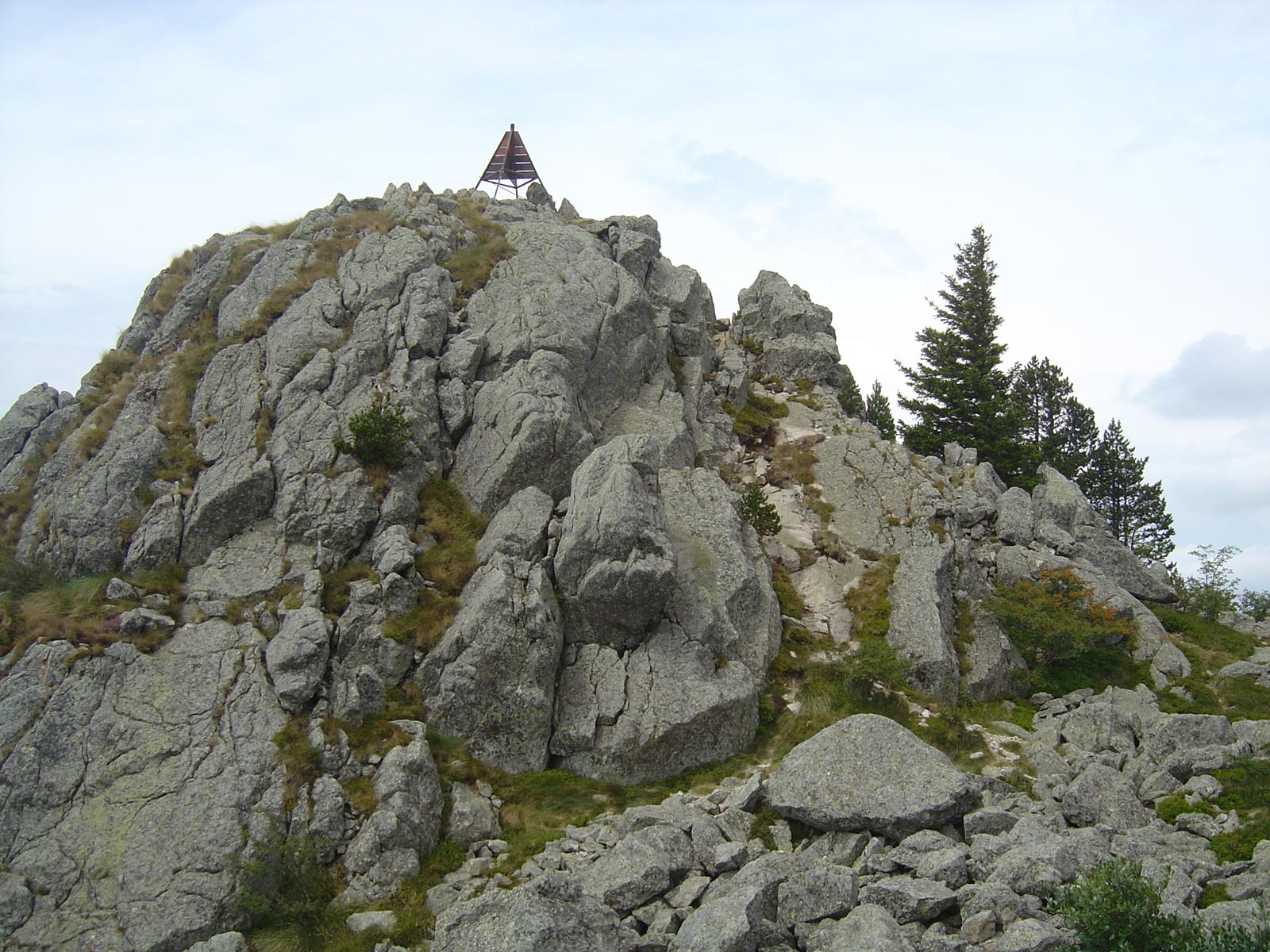 Rocher du signal de Coucoulude (07, PNR des Monts d'Ardèche, massif du Tanargue) 1448m